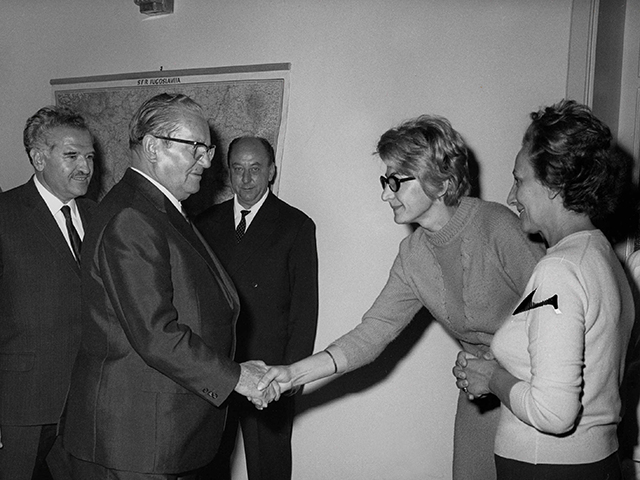 Srpski (latinica): Predsednik Tito u poseti jugoslovenskoj ambasadi u Adis Abebi, 11.02.1970 Inventarski broj:1970 425 0083